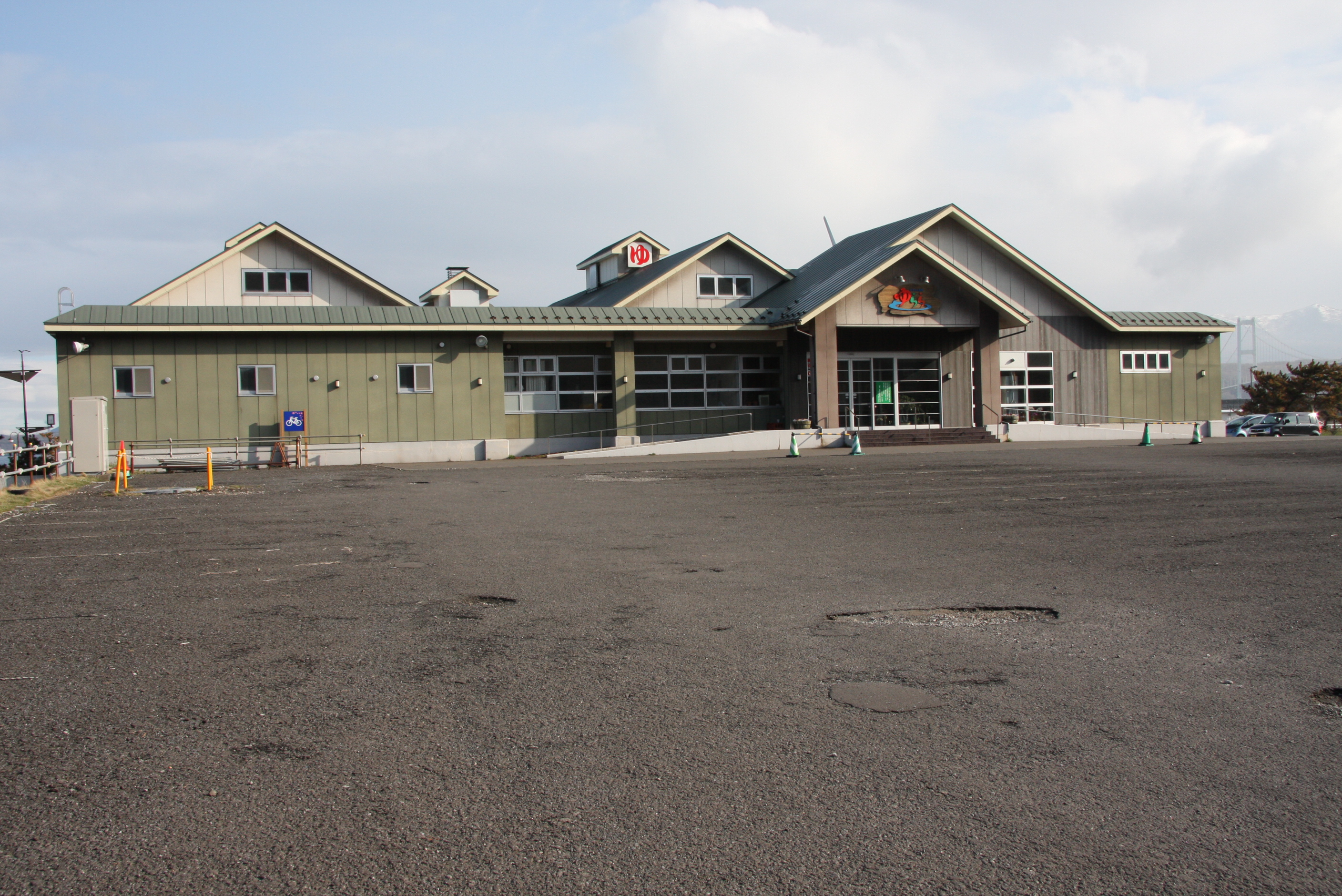 むろらん温泉 室蘭市